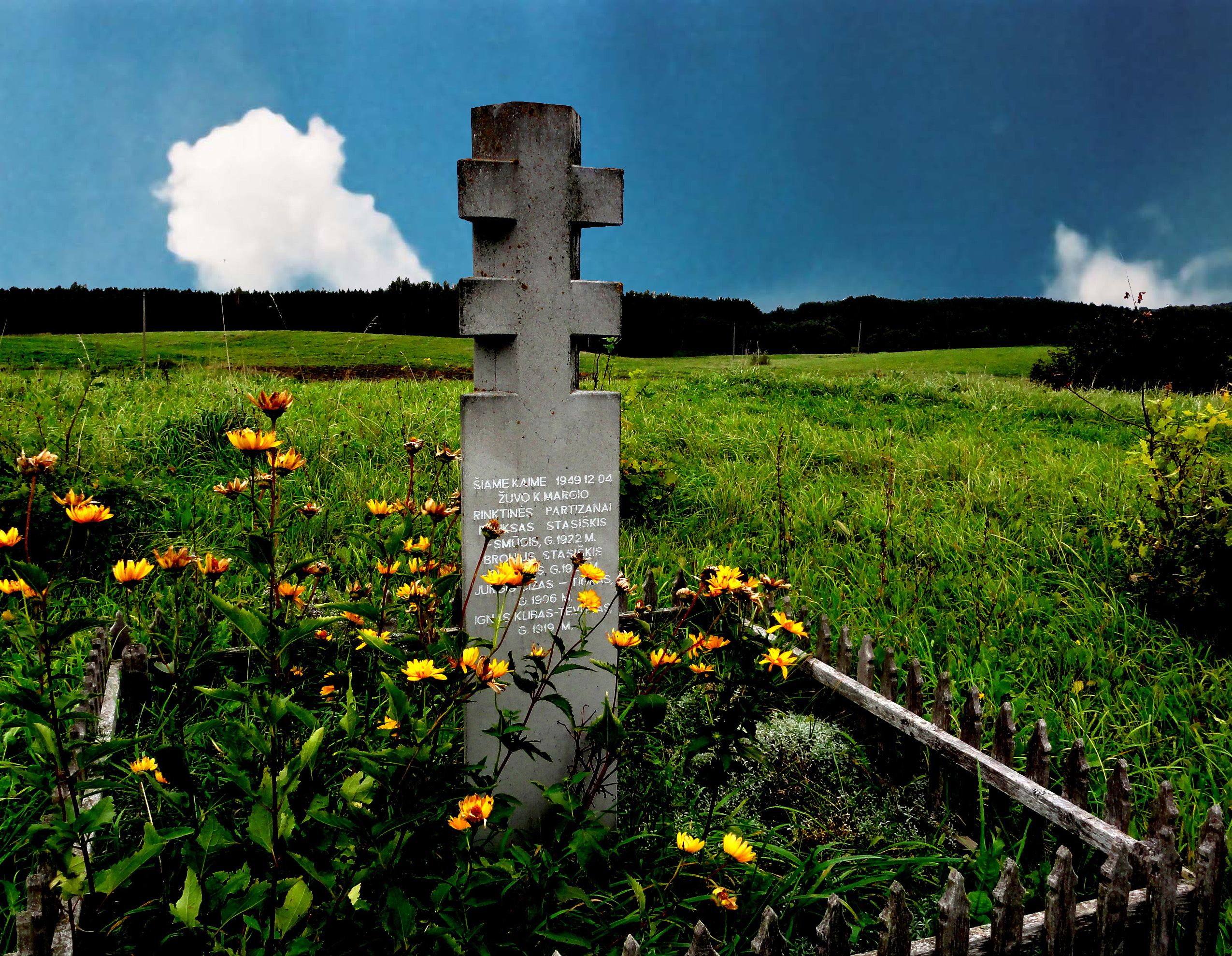 Paminklas partizanams.